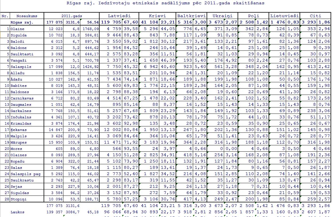 Latvijas 2011 gada tautas skaitīšanas dati